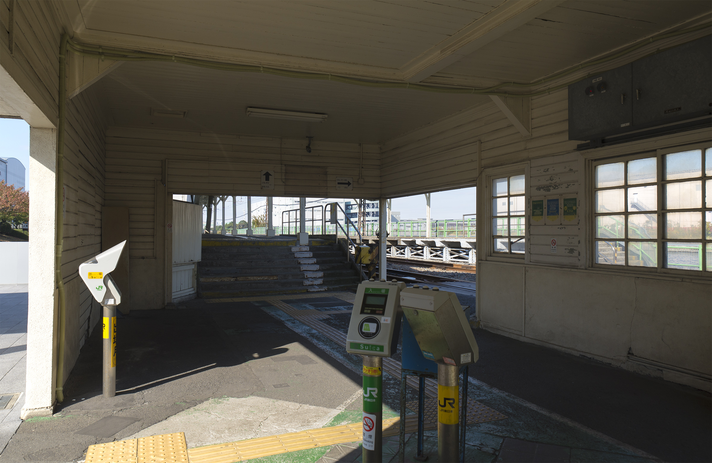 東日本旅客鉄道株式会社鶴見線新芝浦駅改札